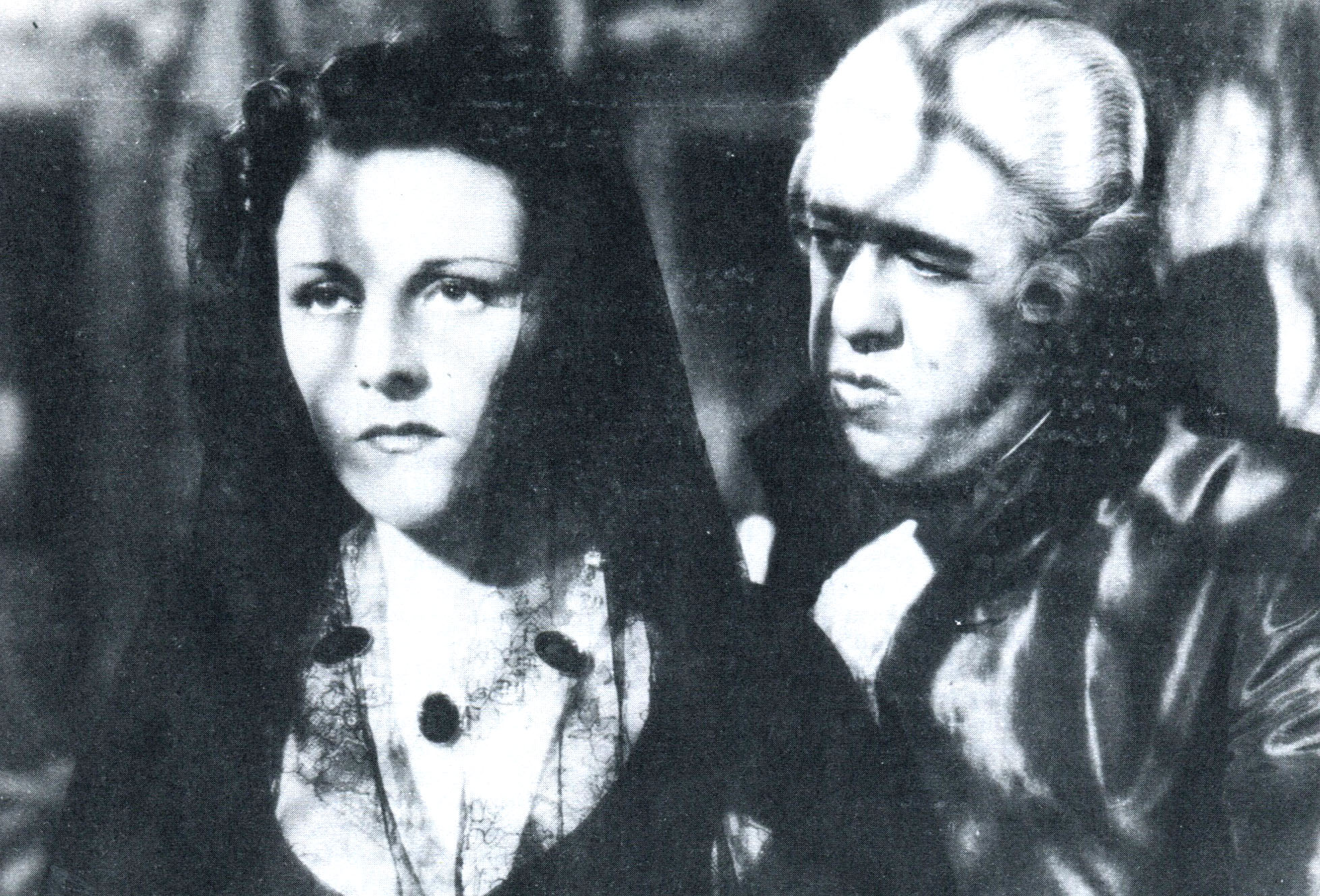 Imperia Argentina e Michel Simon in Tosca (Renoir + Koch, 1941)